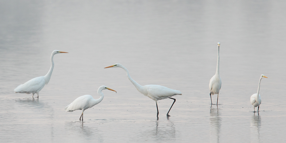 Silberreiher im Ilkerbruch